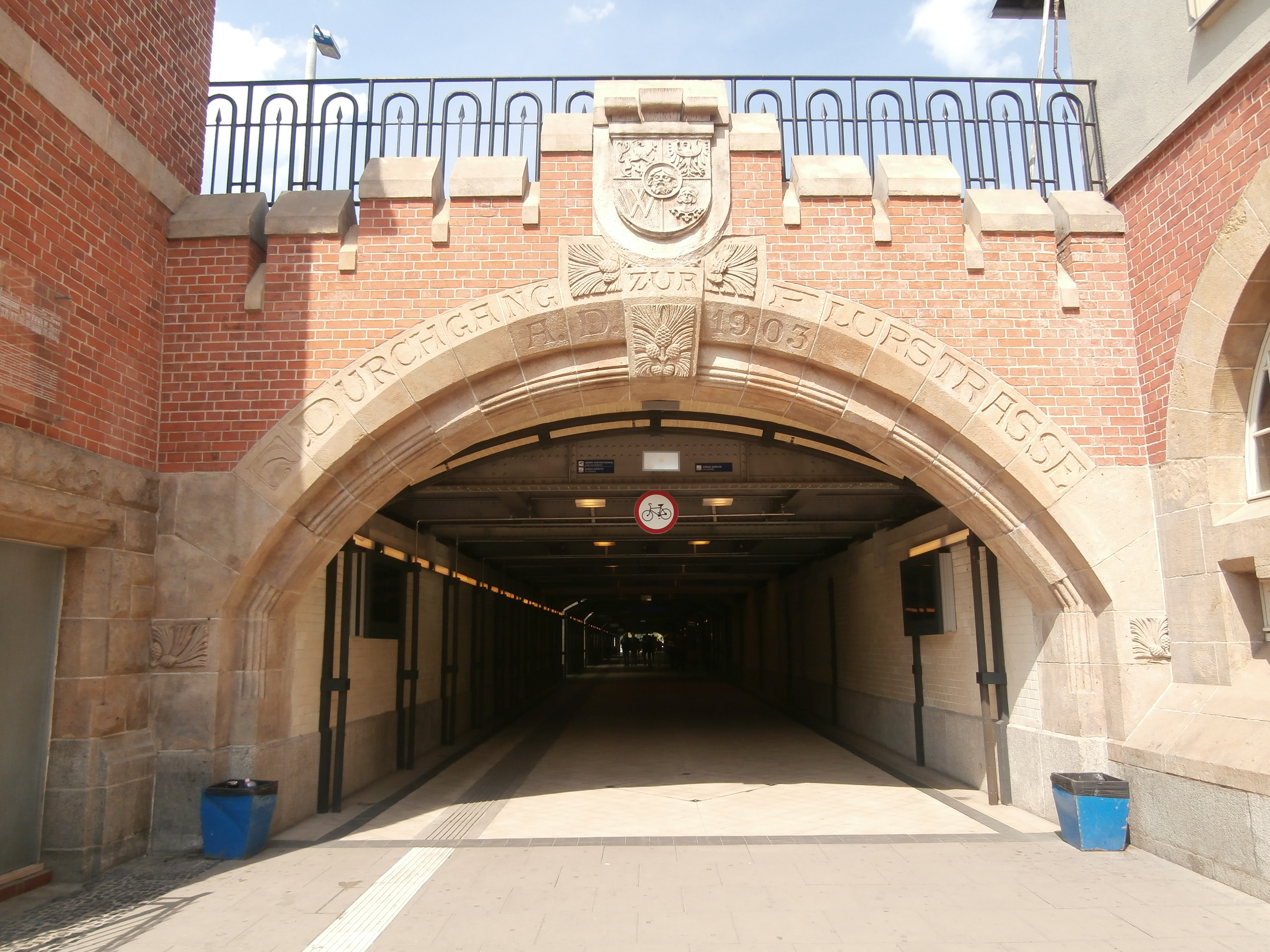 Wejście do przejścia podziemnego pod Dworcem Głównym we Wrocławiu od strony ul. Suchej (stan z 2015 r.). Widoczny napis: Durchgang zur Flurstrasse A.D. 1903 ("przejście do ulicy Łanowej rok 1903"[1]).